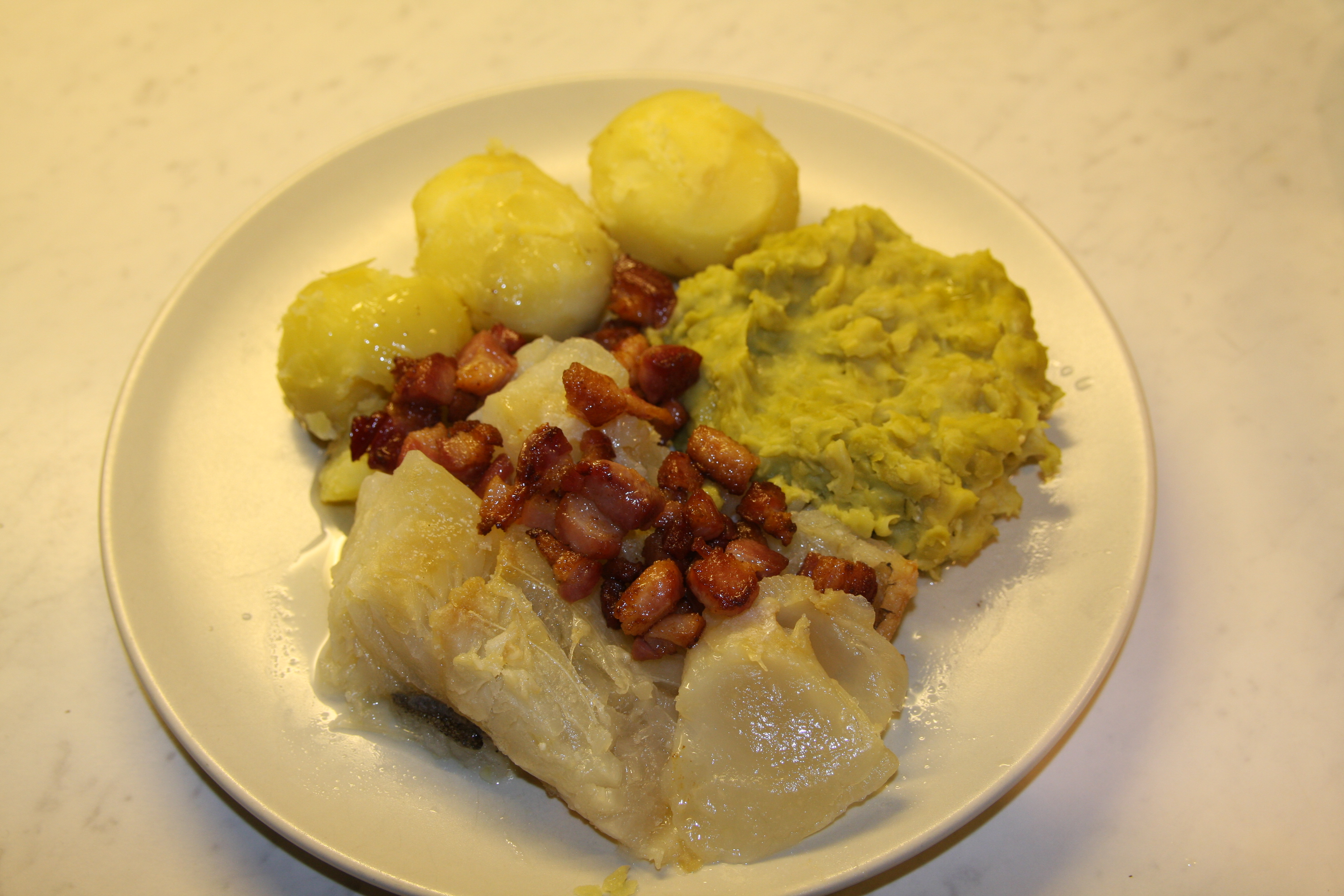 Lutefisk, Tradisjonell, servert med poteter, ertestuing og bacon